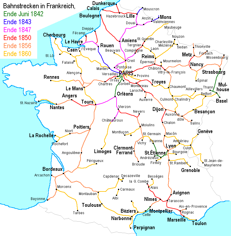 Bahnstrecken in Frankreich bis 1860